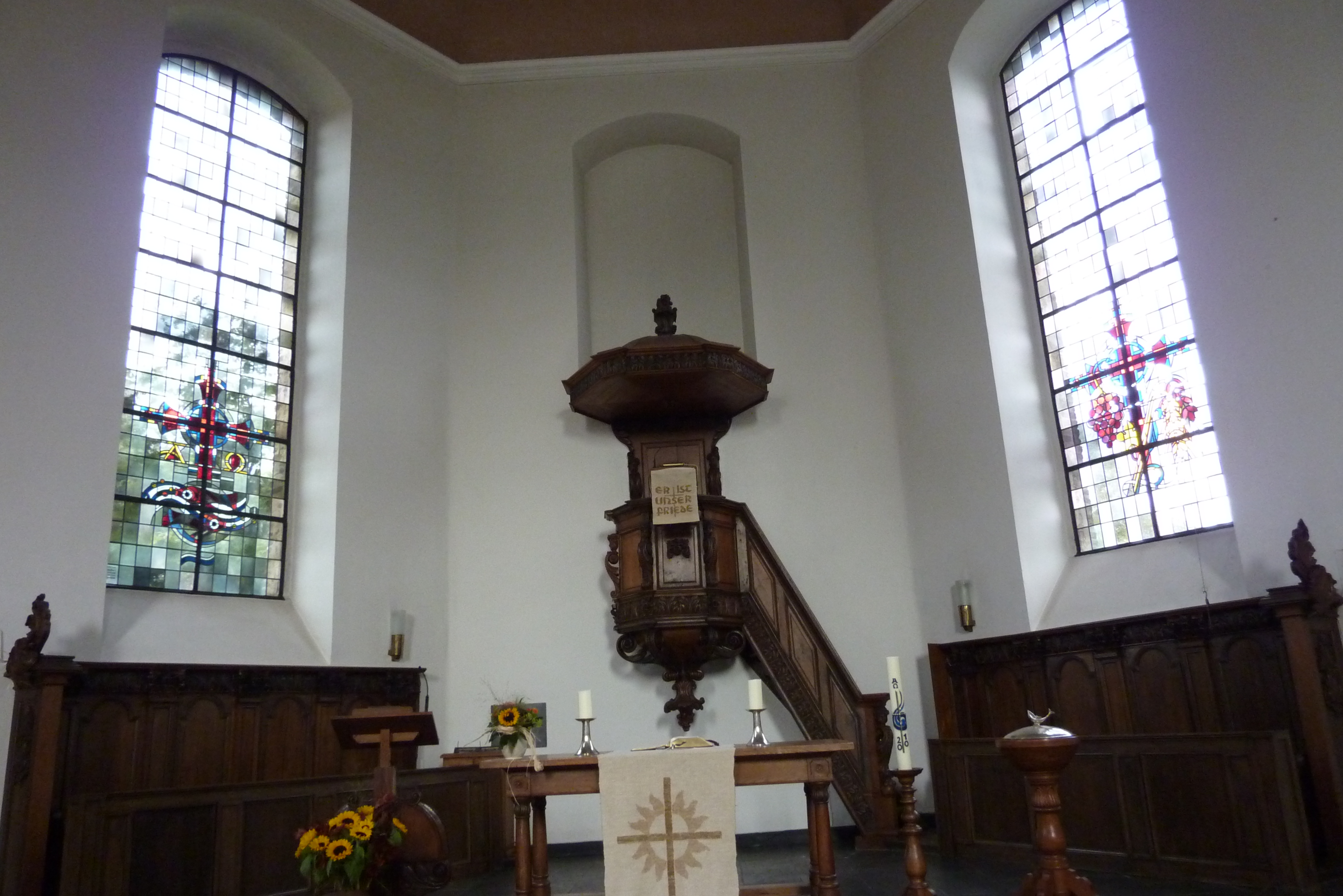 Altarraum der evangelischen Kirche in Linnich